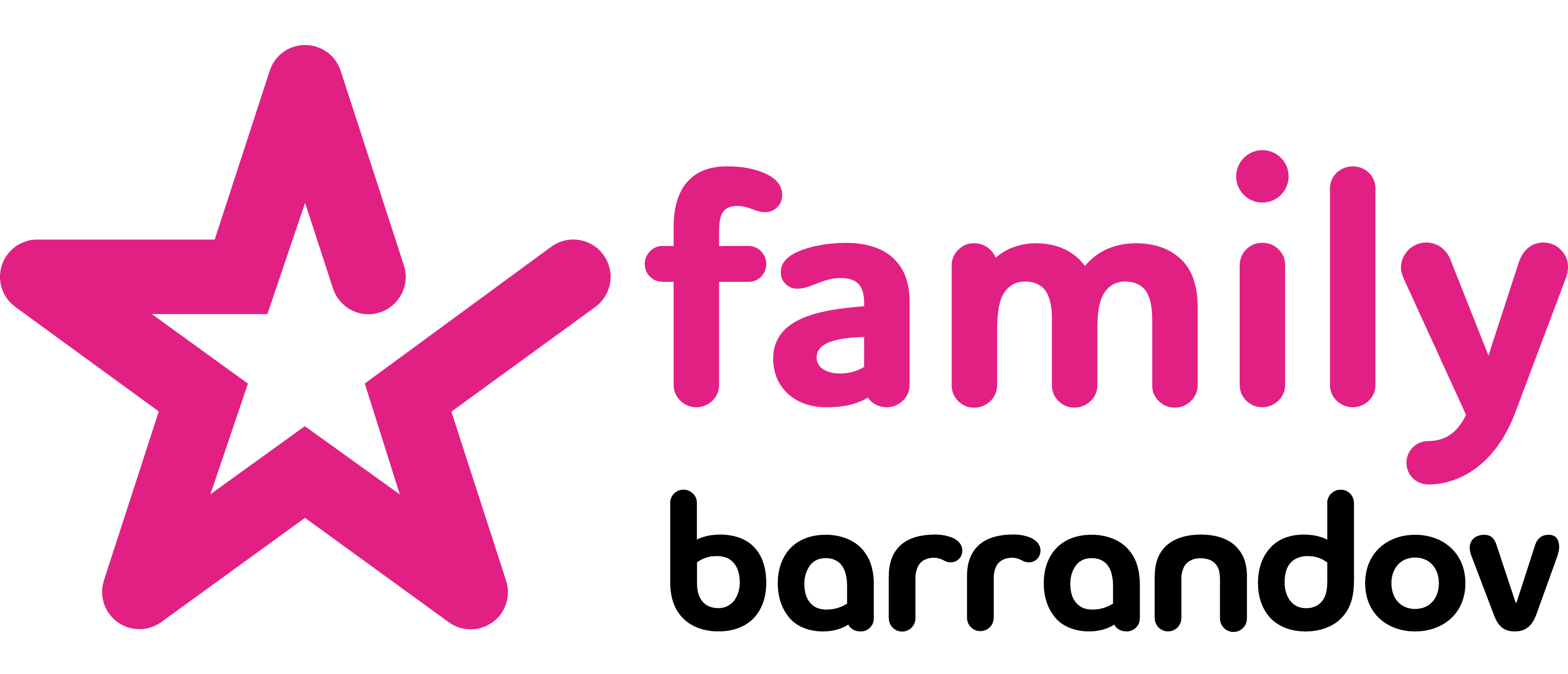 logo